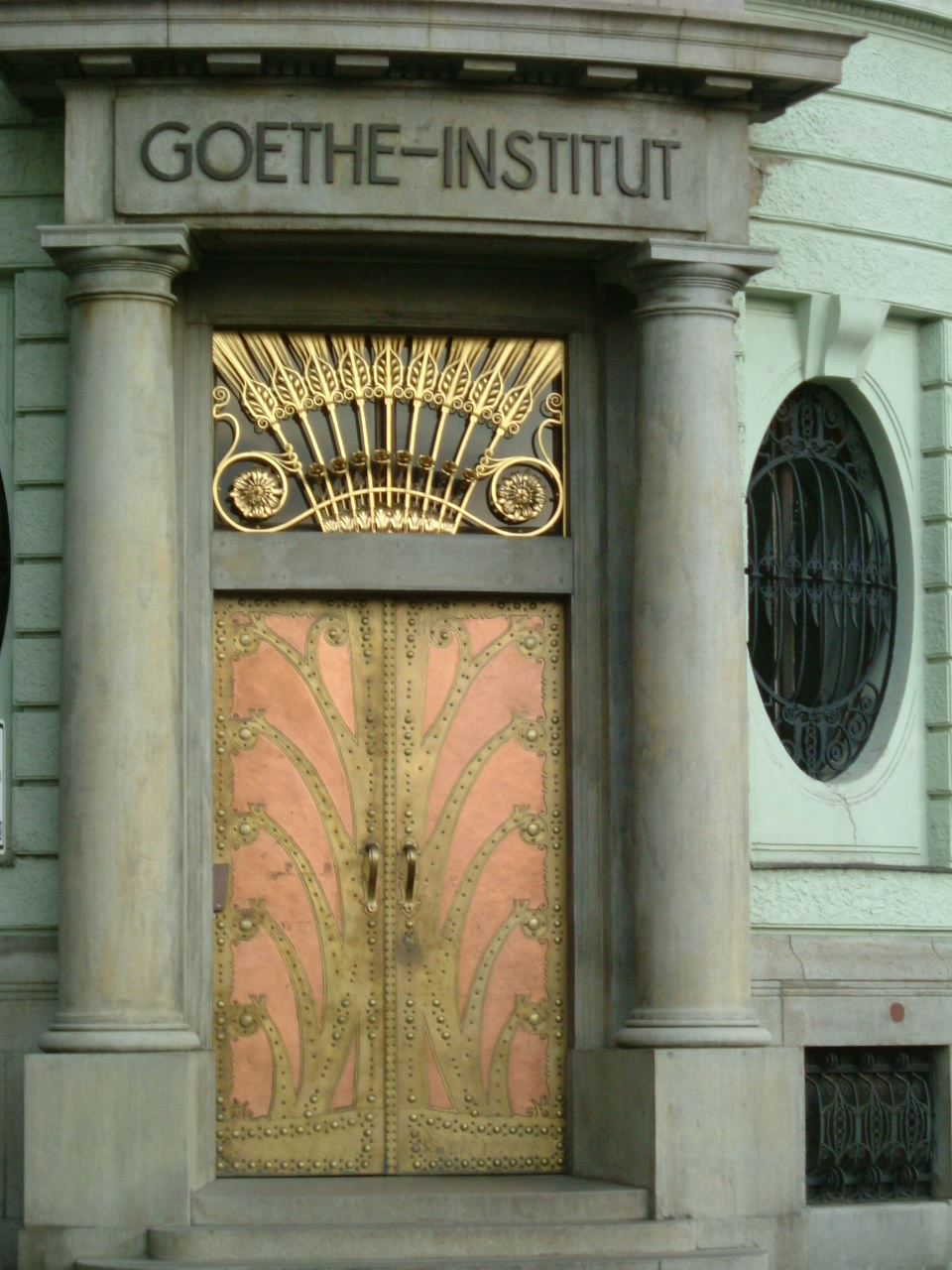 Tür des Goethe-Institutes in Prag (ehem. Botschaft der DDR in Prag)